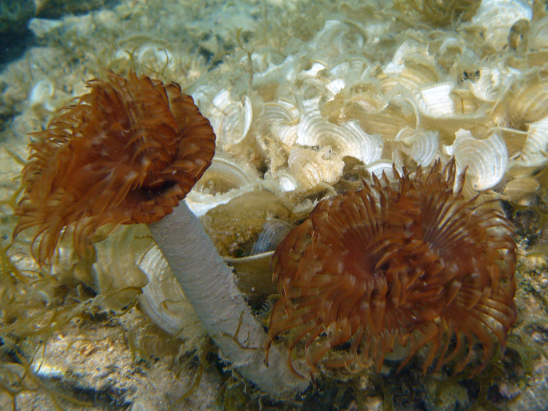 Spirographis spallanzanii (=Sabella spallanzanii) from Croatia